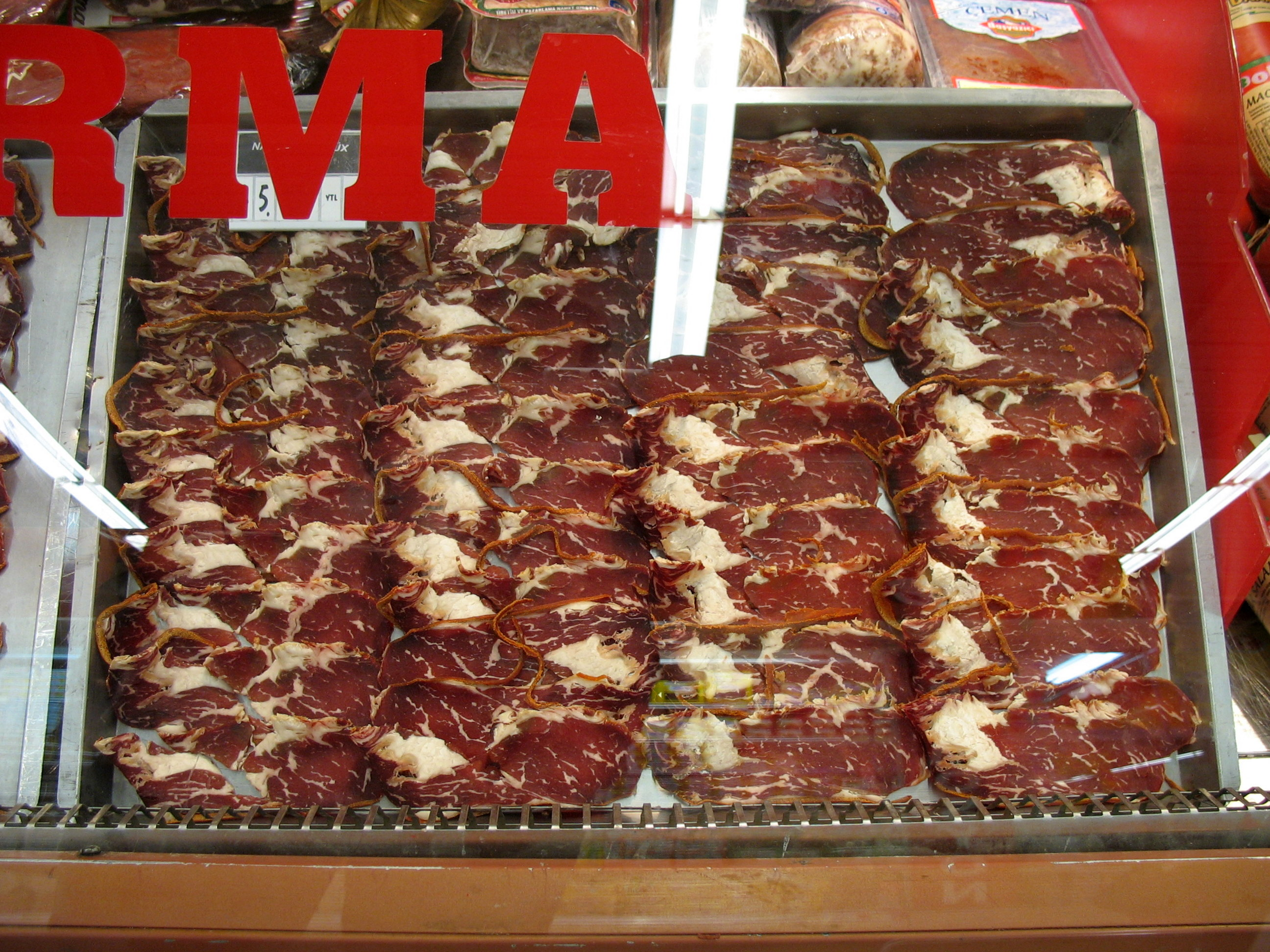 Pastırma